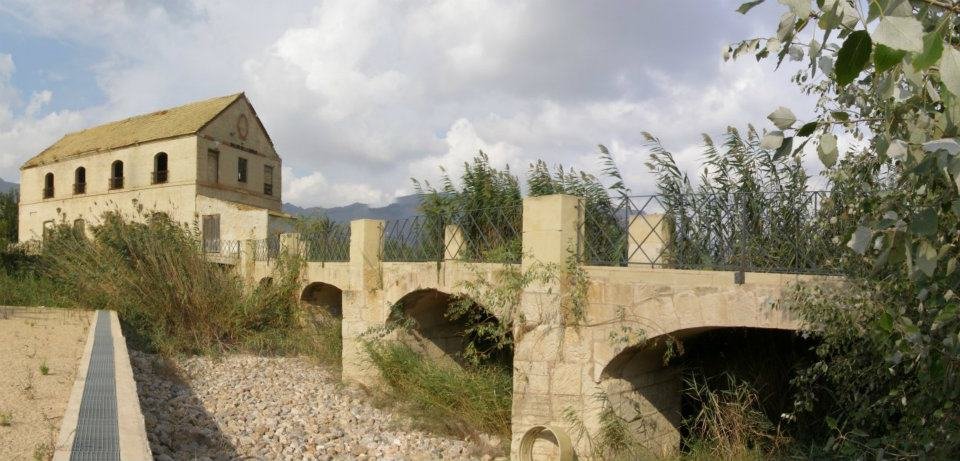 Puente y molino